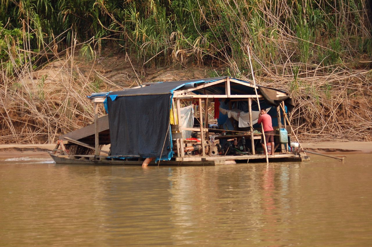 L'orpaillage clandestin est une des causes de la pollution et de la déforestation dans la région de Madre de Dios.